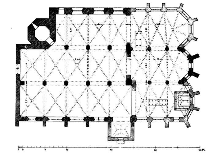 Grundriss der Markuskirche in Butzbach, Wetteraukreis, Hessen, Deutschland